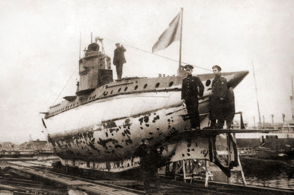 Das bulgarische U-Boot Nr 18, ein deutsches Boot der UB-I Klasse. Ehemals SM UB-8 von 1915